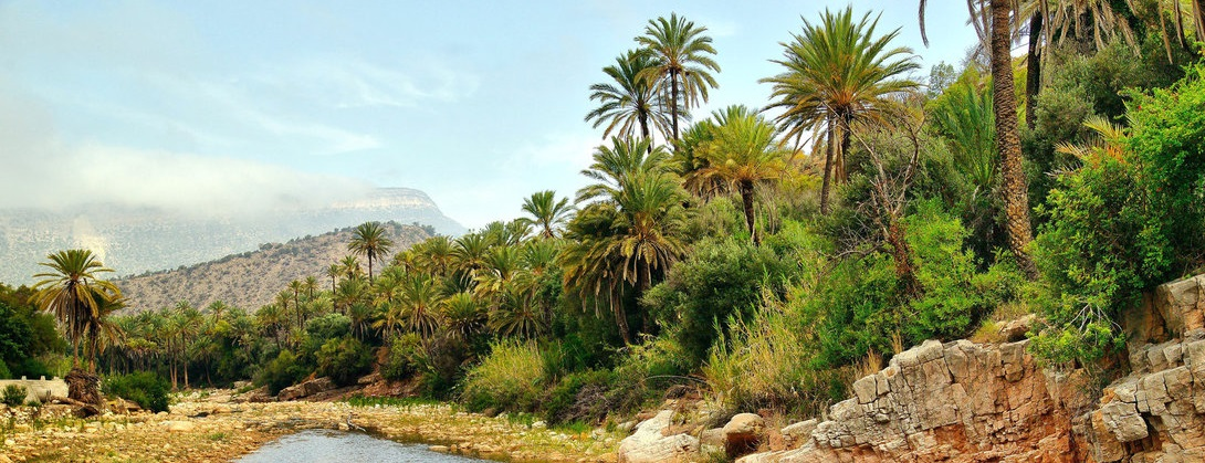 Géographie du Maroc